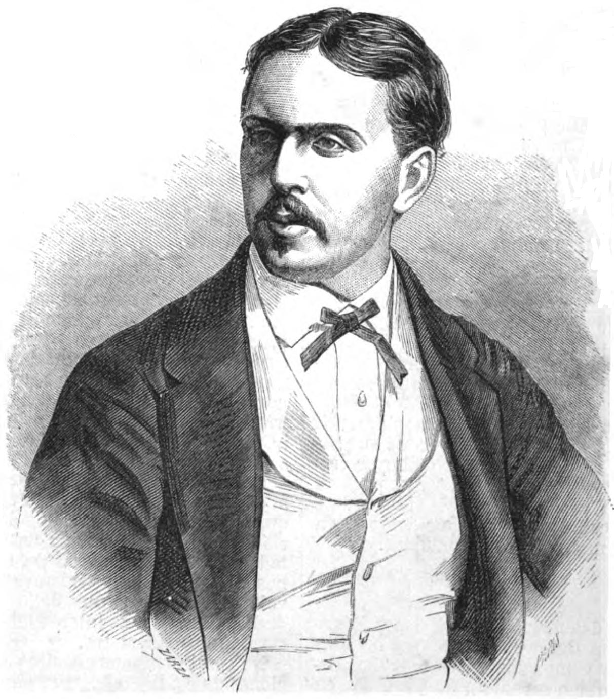 D. Cárlos de Borbon